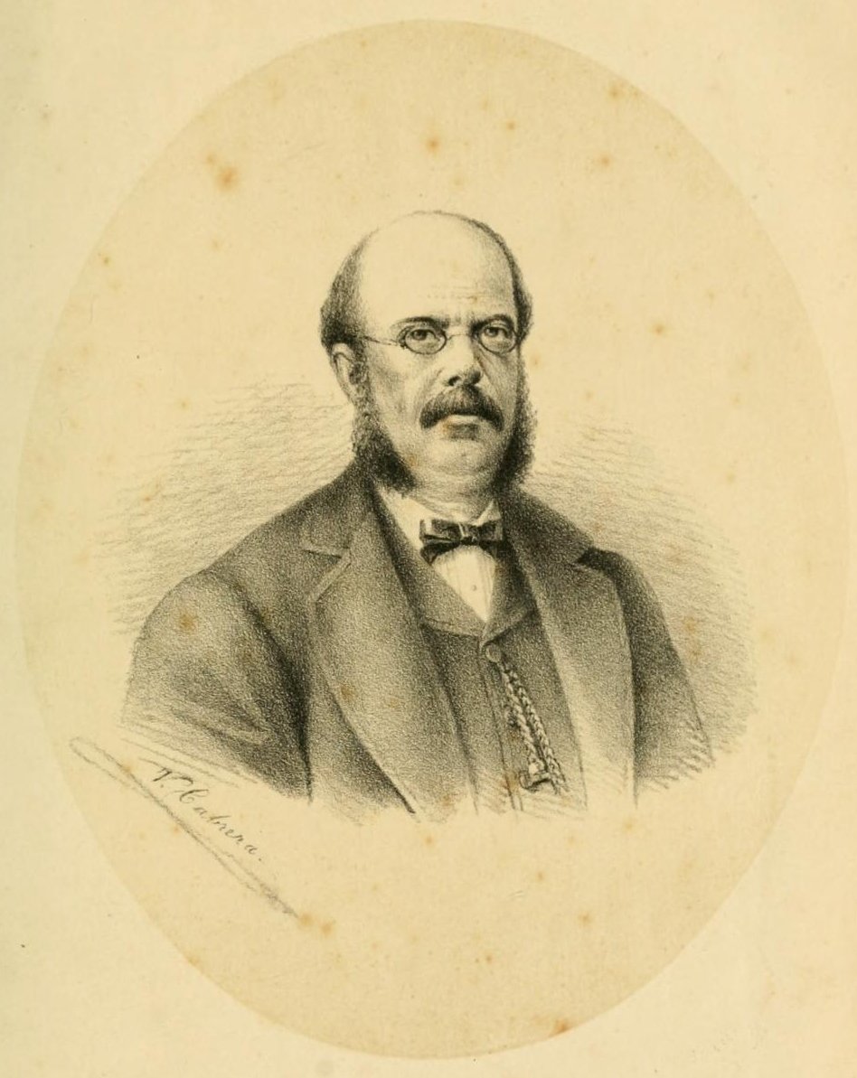 Retrato autografiado de Antonio Pirala